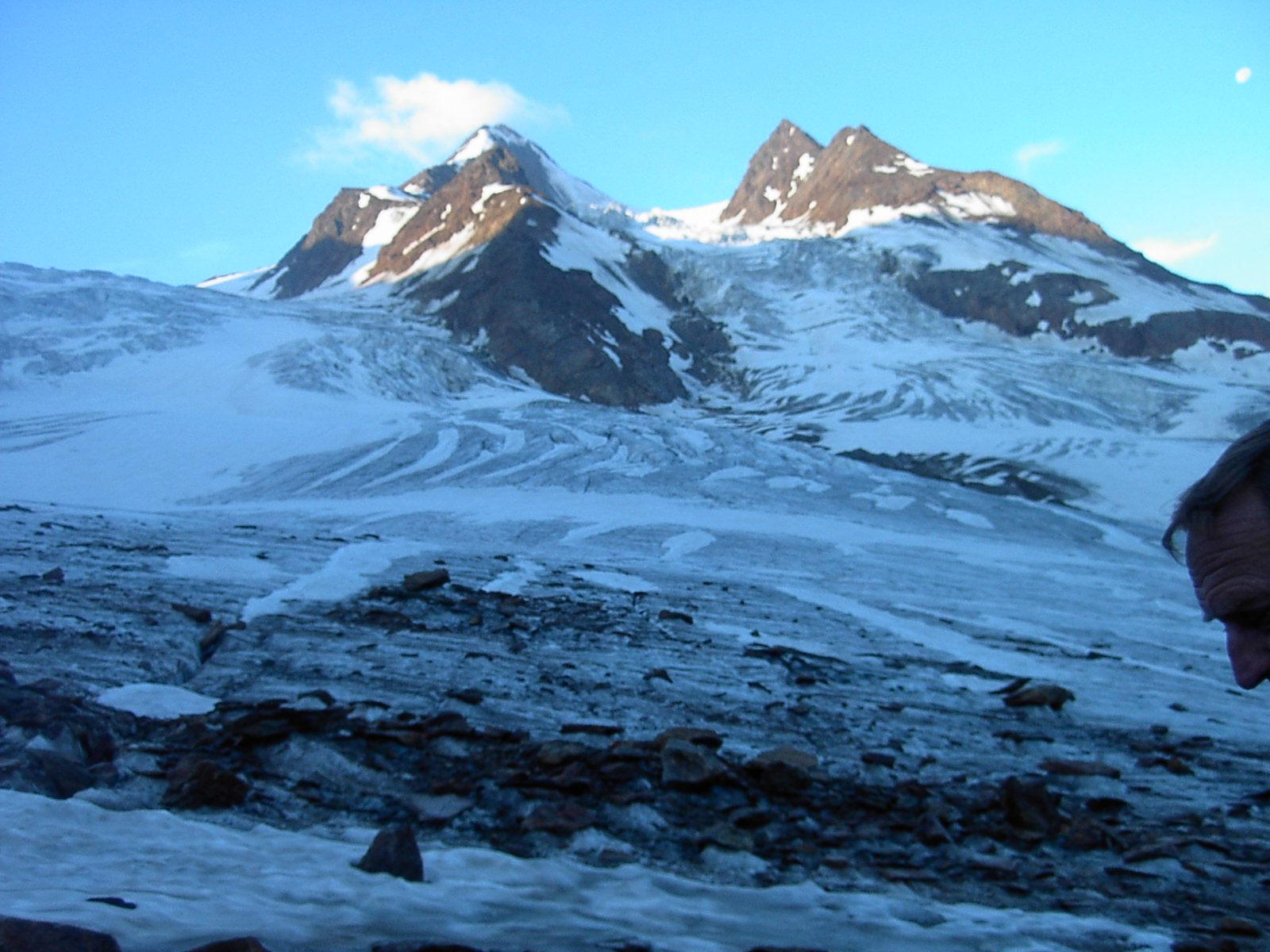 Weißkugel links und Innerer Bärenbartkogel vom Langtauferer Ferner Sonstiges